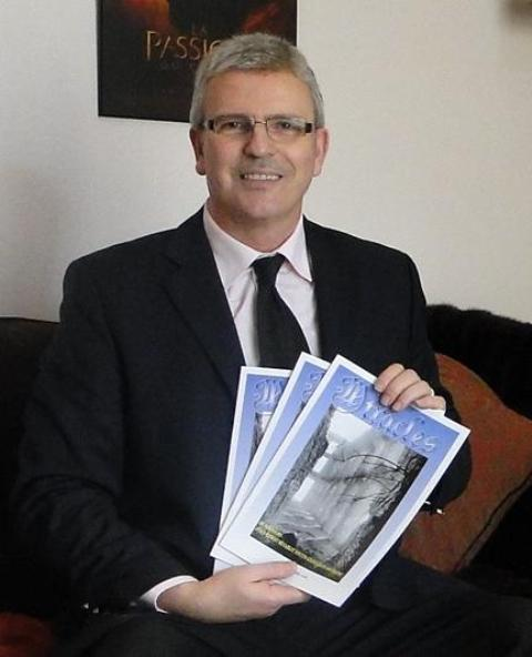 Le pasteur Michel Genton pour la présentation de sa nouvelle brochure "Miracles"